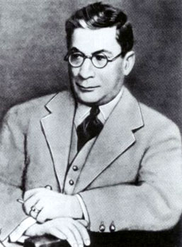 Зиновий Исаевич Гржебин (первоначально — Зейлик Шиевич Гржебин;июль 1877, Чугуев, Харьковская губерния — 4 февраля 1929, Ванв)